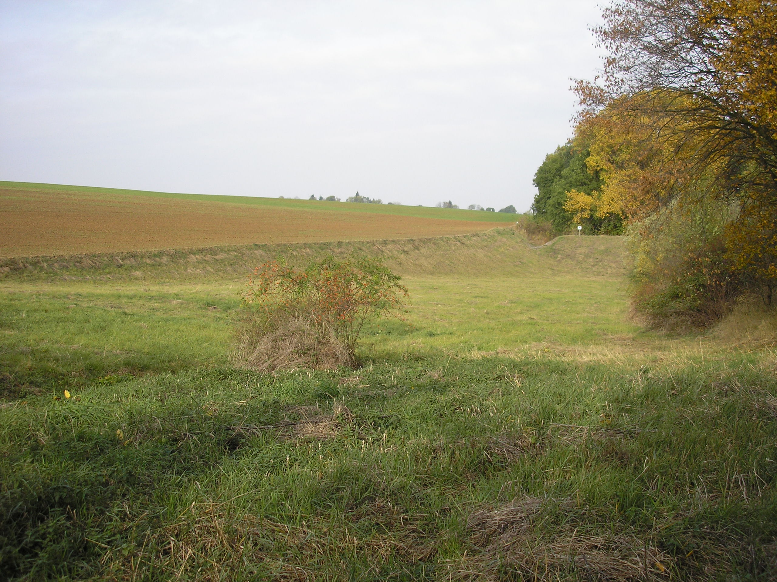 Pohled na suchý poldr z jižní strany